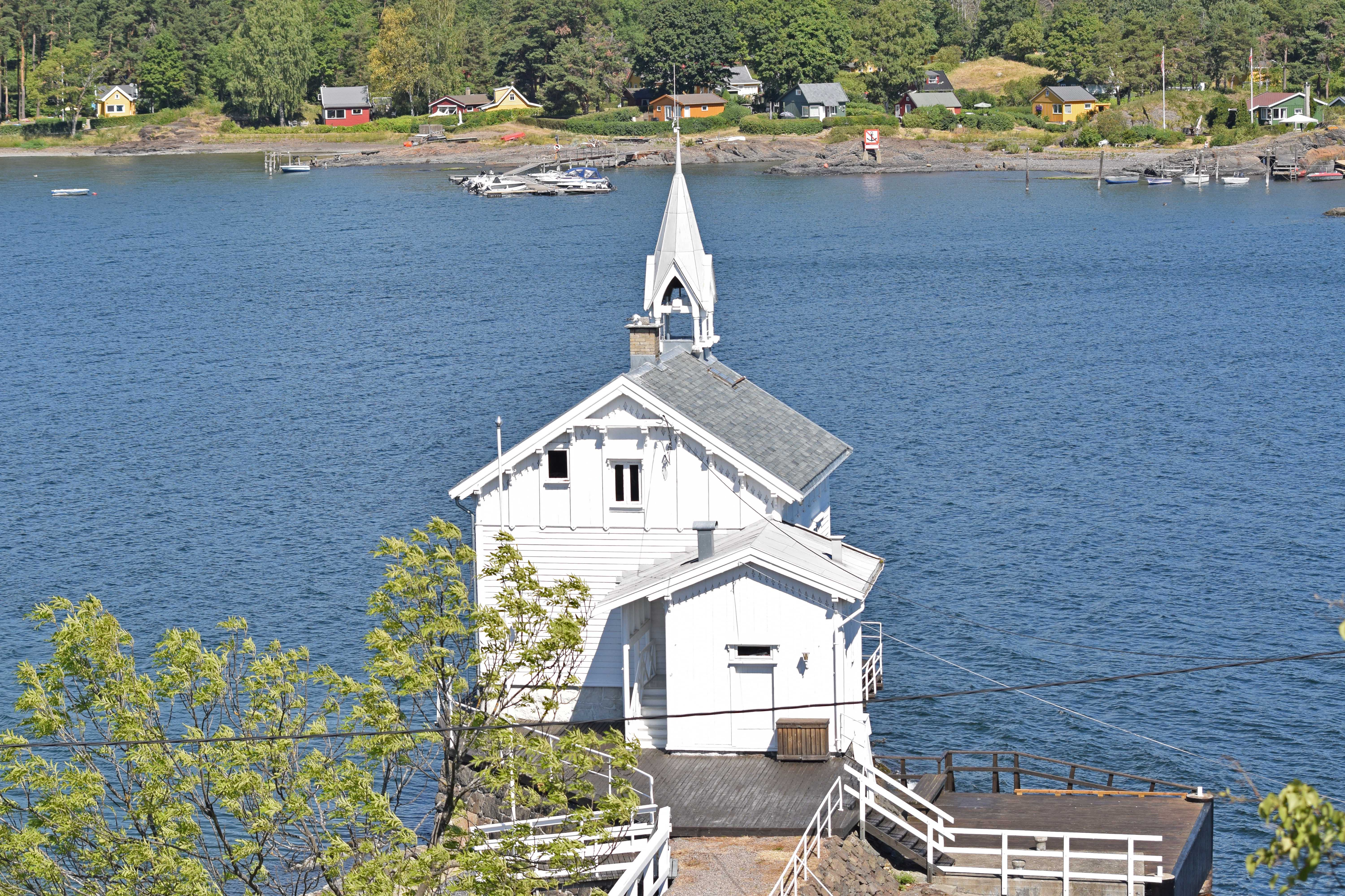 Heggholmen fyr sett mot Lindøya